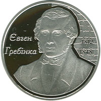 Монета Євген Гребінка реверс